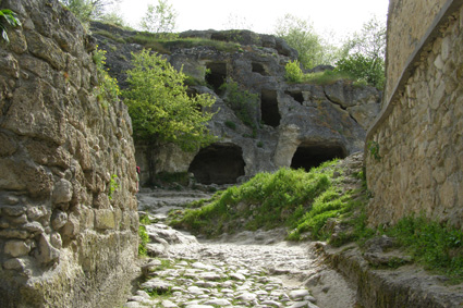 Chufut-Kale (Ukraine)